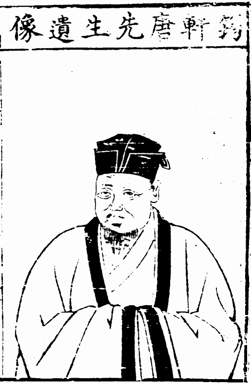 中文（中国大陆）: 筠轩唐先生遗像，载《唐氏三先生集》